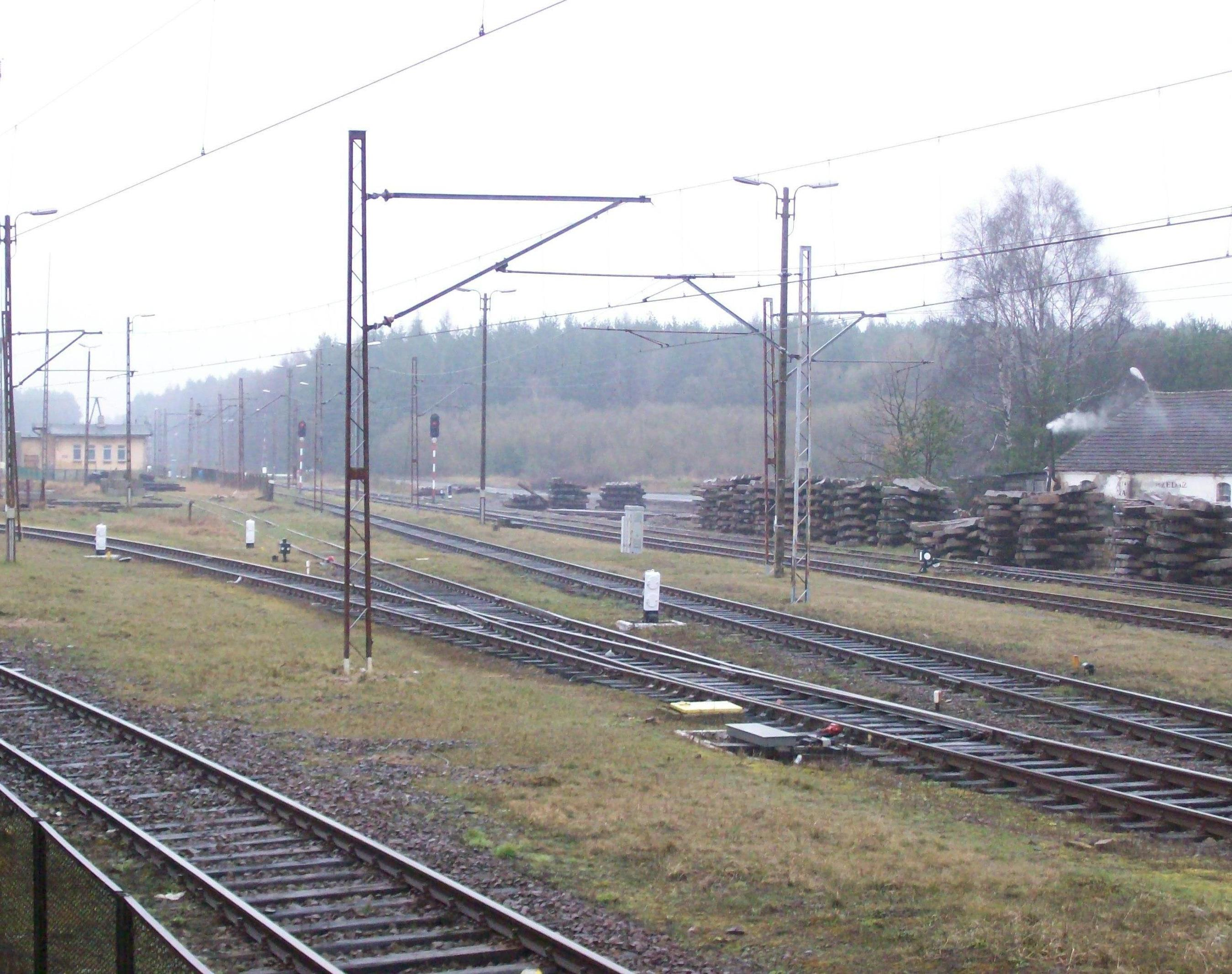 Linia kolejowa 401 okolice Wysokiej Kam.